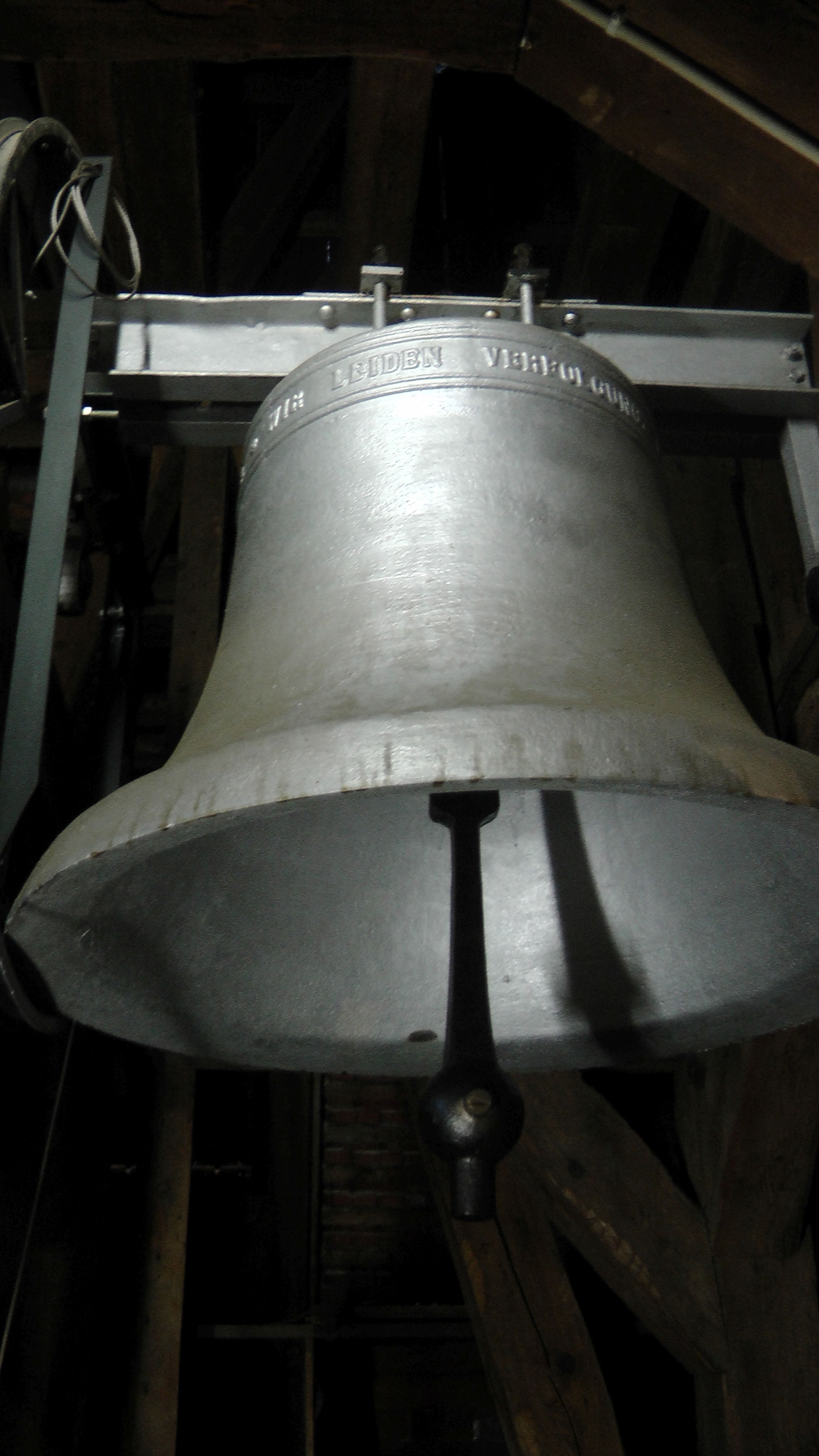 Berlin Dahlem St.Annen Kirche Grosse Glocke